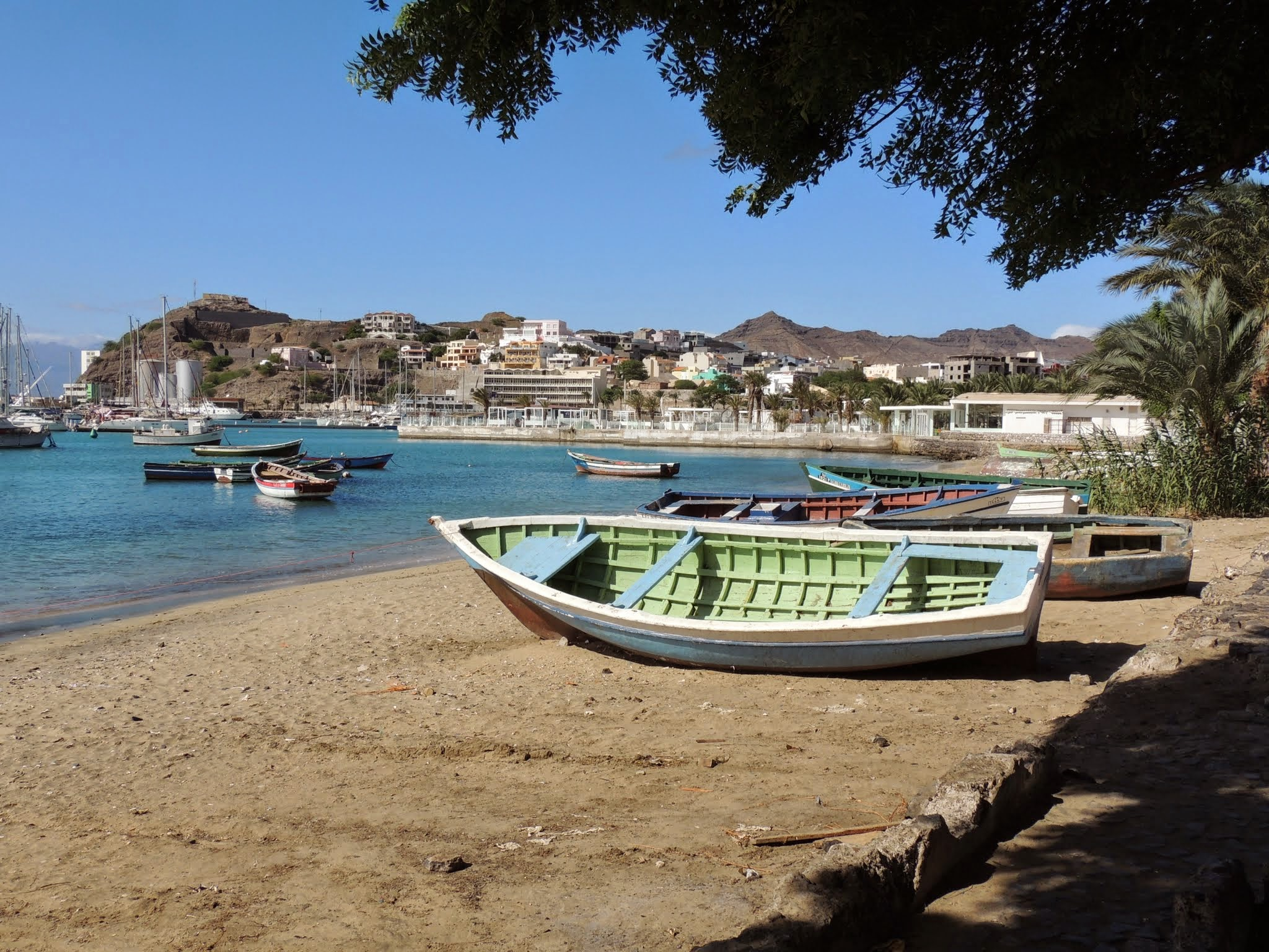 la baie de Mindelo (Cap-vert) avec au premier plan de petites embarcations de pêche.